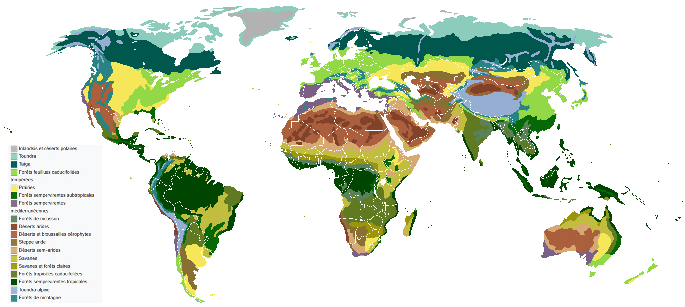 Les principaux biomes du monde (avec légende en français). Dessinés à la main à l'aide de cartes par Ville Koistinen (user Vzb83)